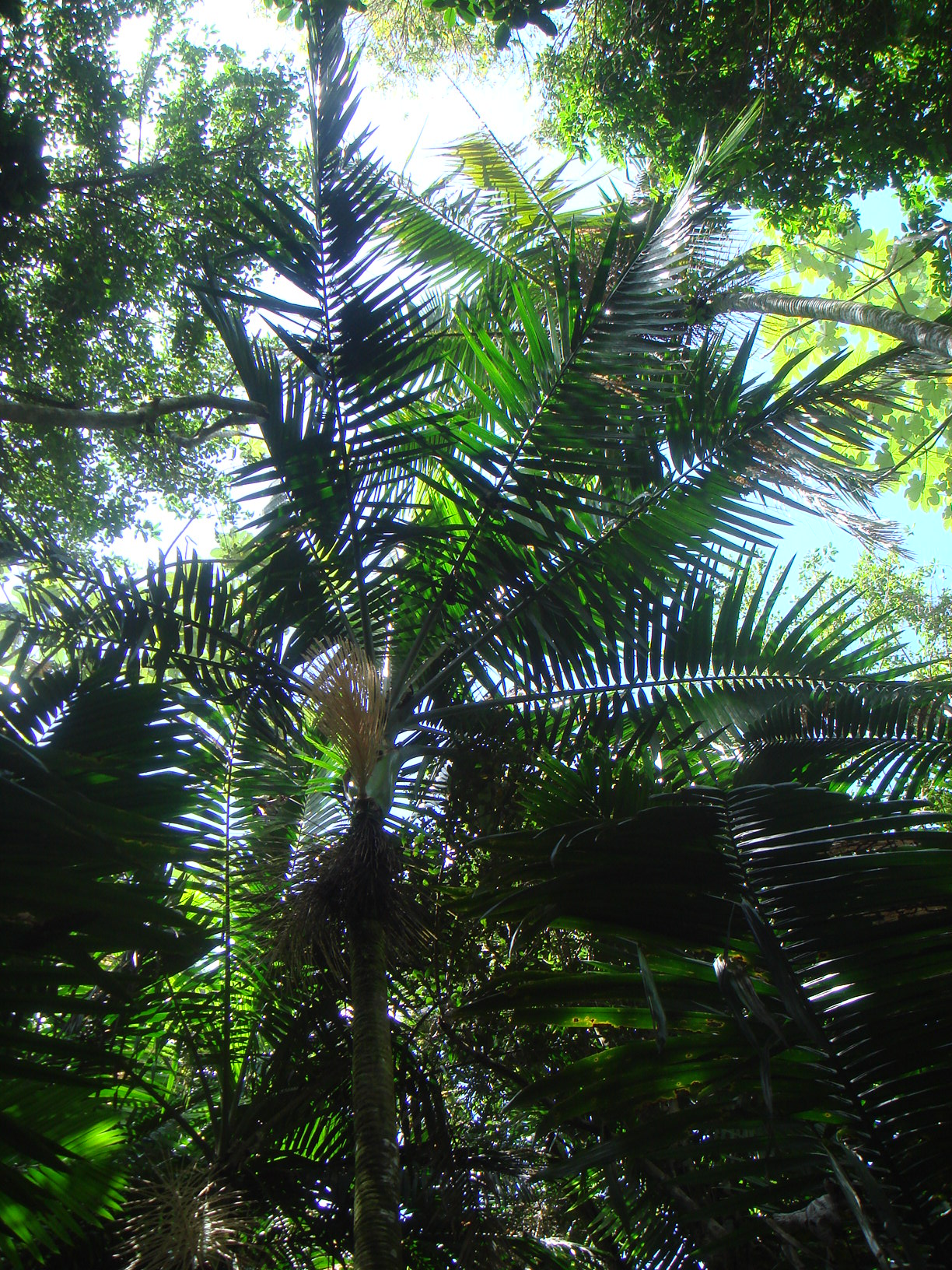 Palma de sierra (Prestoea montana), Bosque Nacional de El Yunque, Puerto Rico.